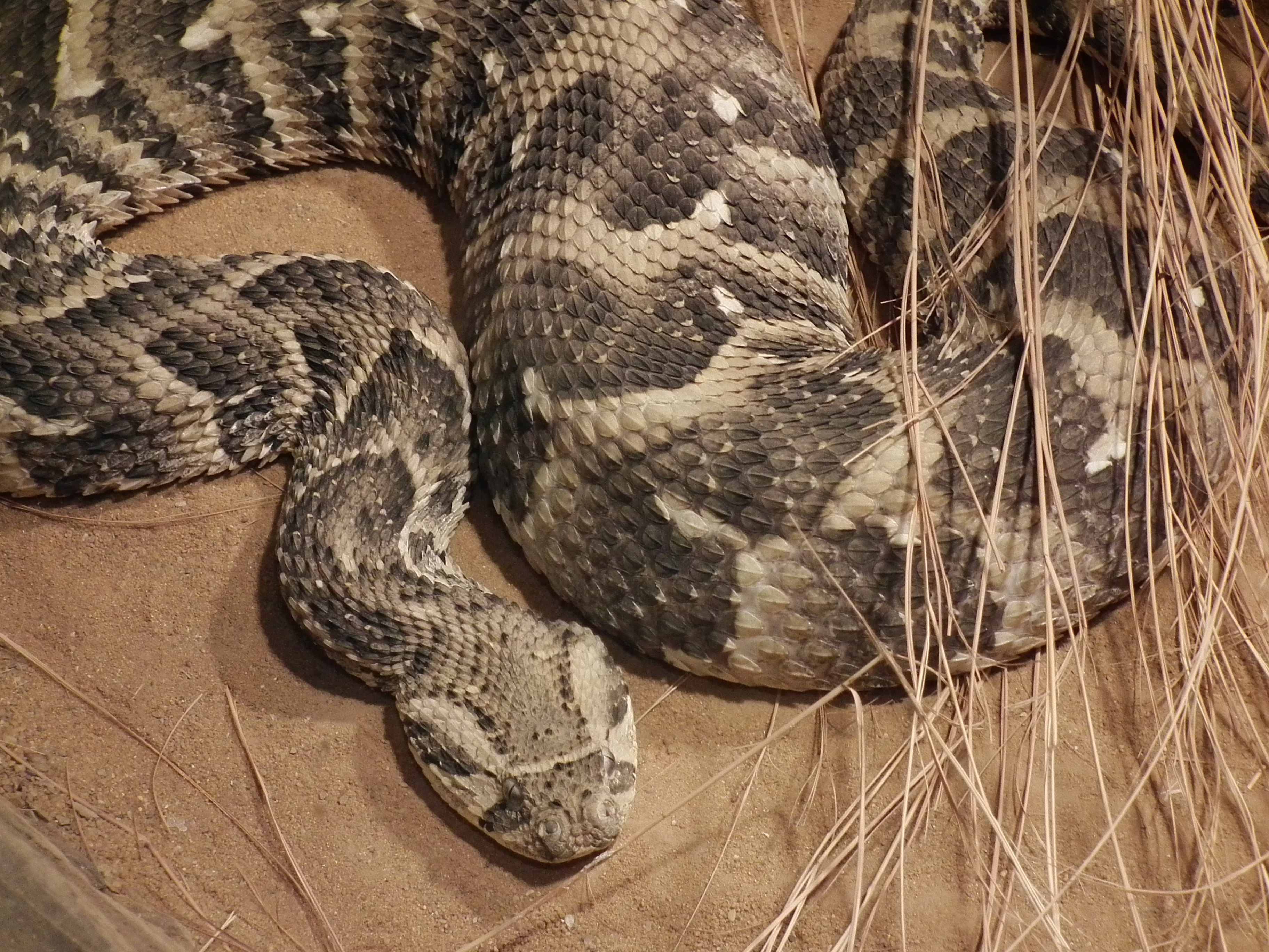 Puffotter (Bitis arietans) im Vivarium Darmstadt (Hessen, Deutschland)